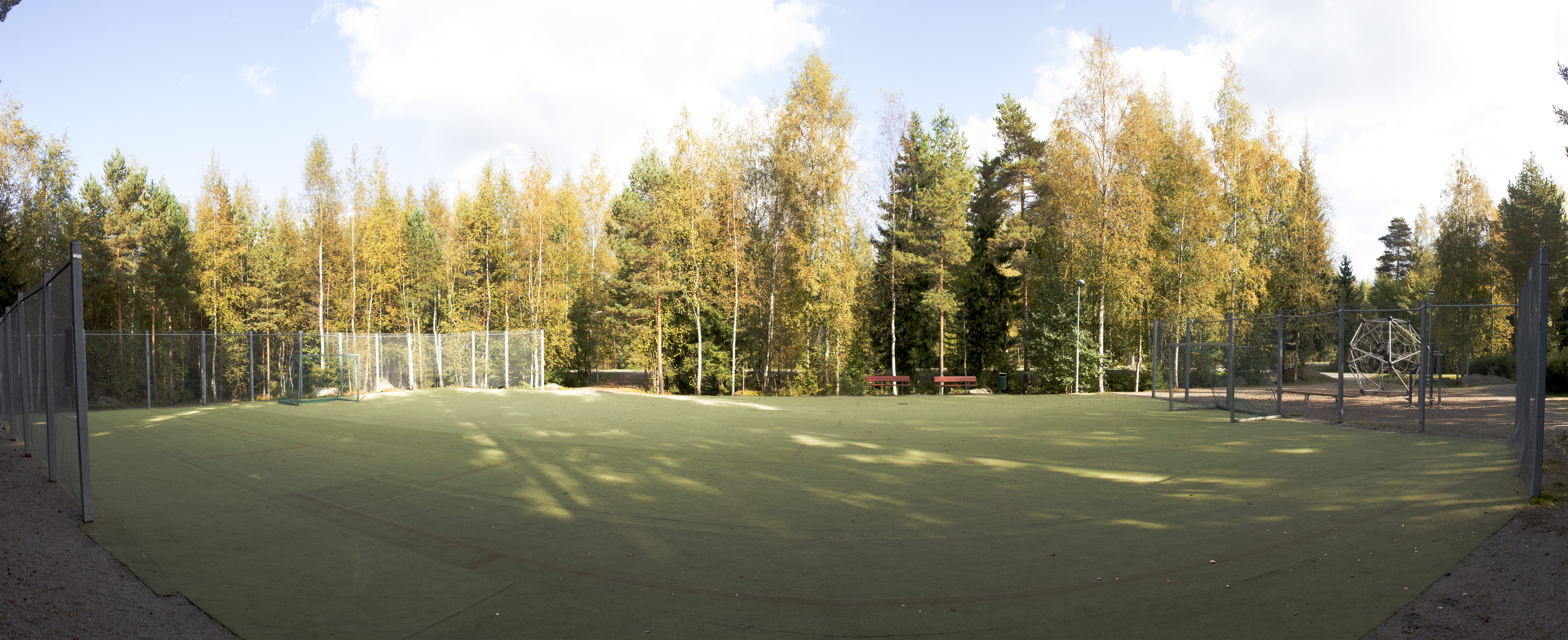 Pikkupehkusuonpuisto ja sen jalkapallokenttä